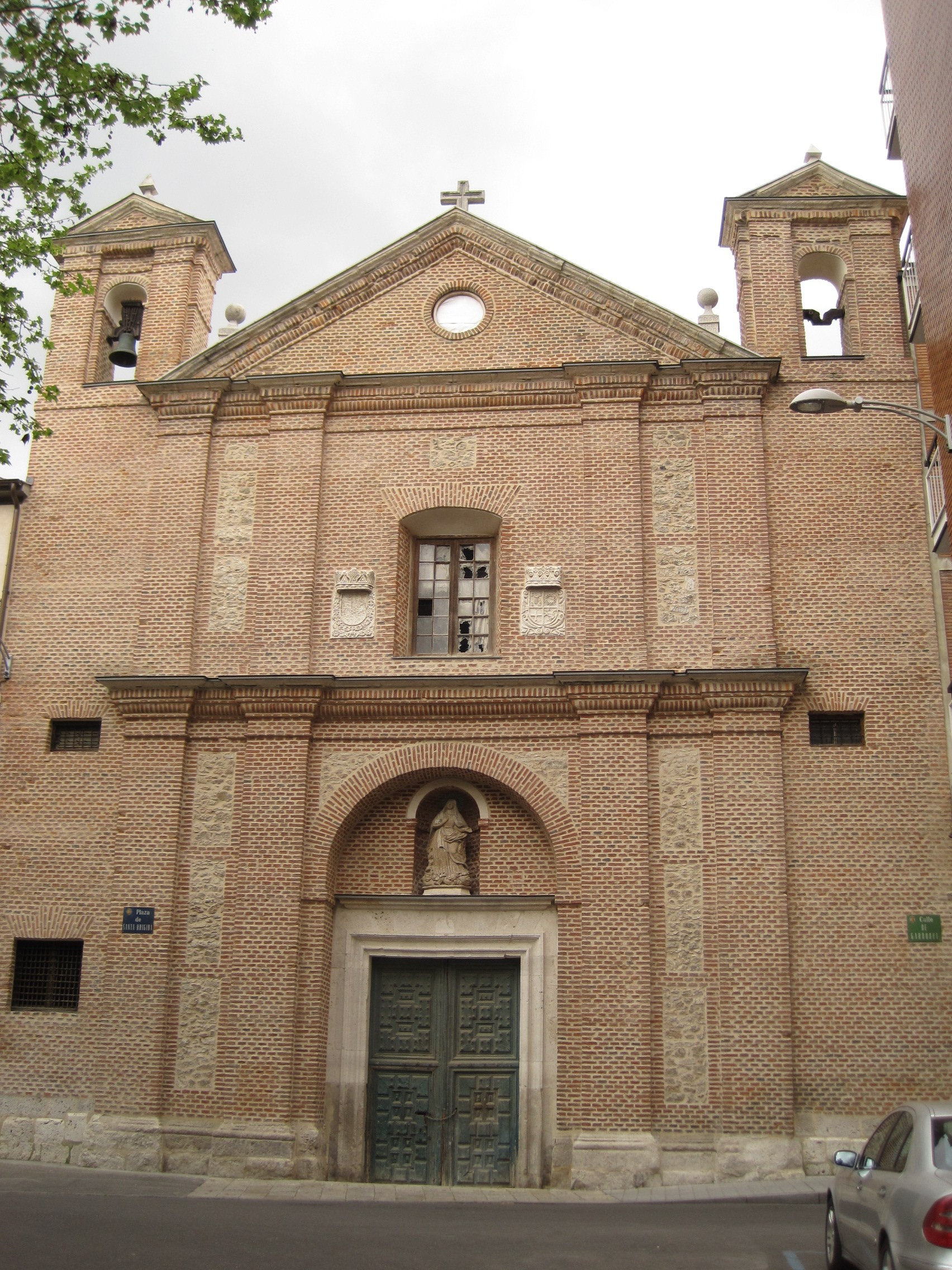 Iglesia del antiguo convento de las Brigidas. Valladolid, España.